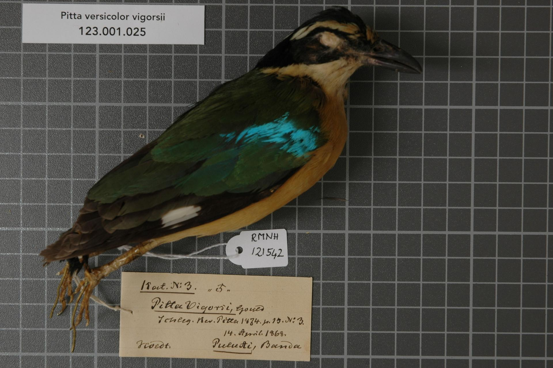 Pitta versicolor vigorsii Gould, 1838